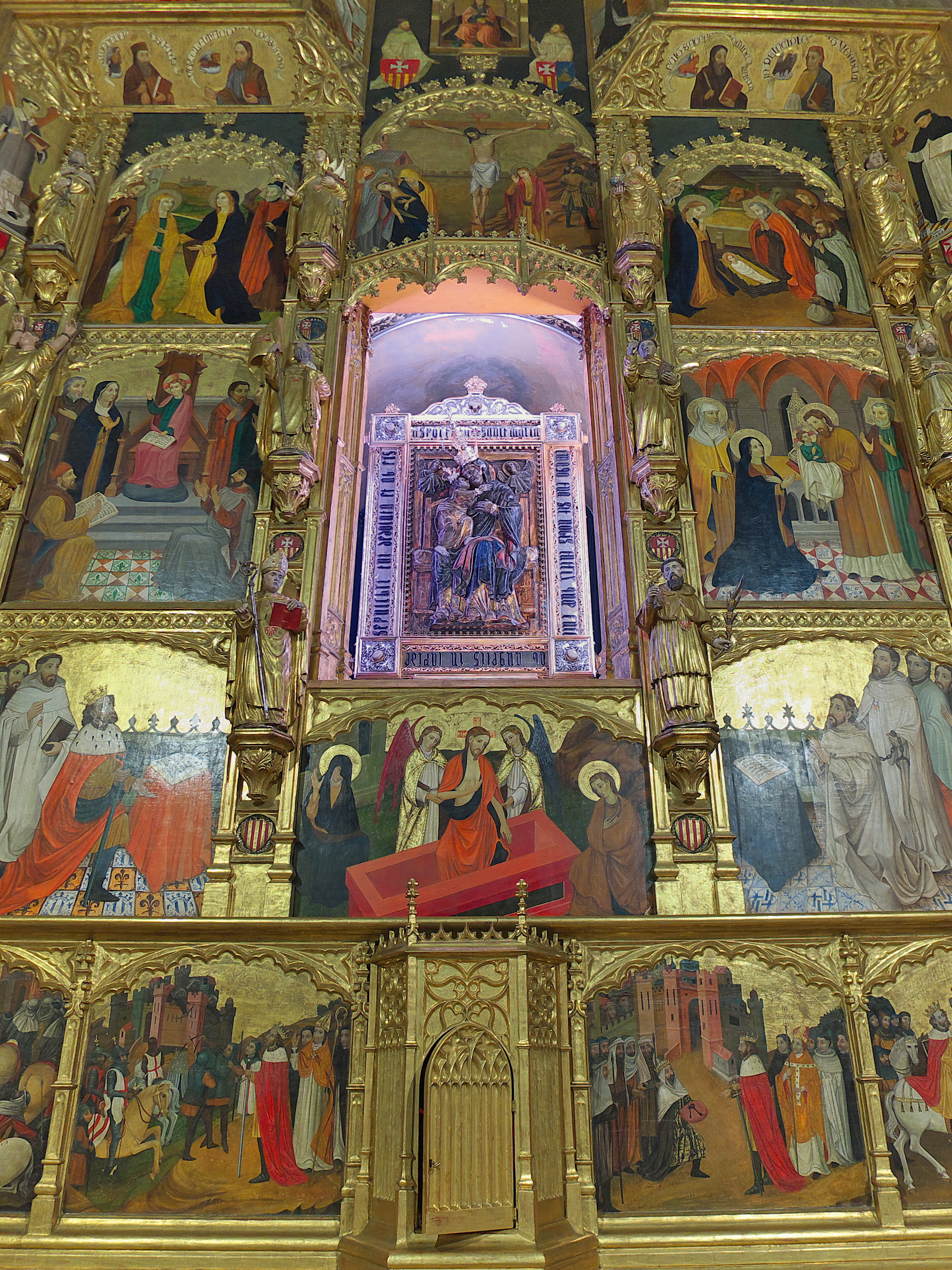 En el centro el icono de la Virgen de los Ángeles, Madre de Dios de El Puig.